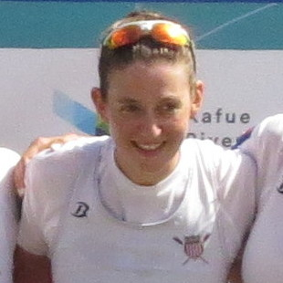 Podium du W4- GBR : CHIN, Rebecca BENNETT, Karen GOODERHAM, Lucinda NORTON, Holly USA : O'BRIEN, Kristine LATZ, Grace MARTELLI, Adrienne et LUCZAK, Grace CHN : YIN, Dameng, CHENG, Wenjing, YI, Liqin et YU, JING